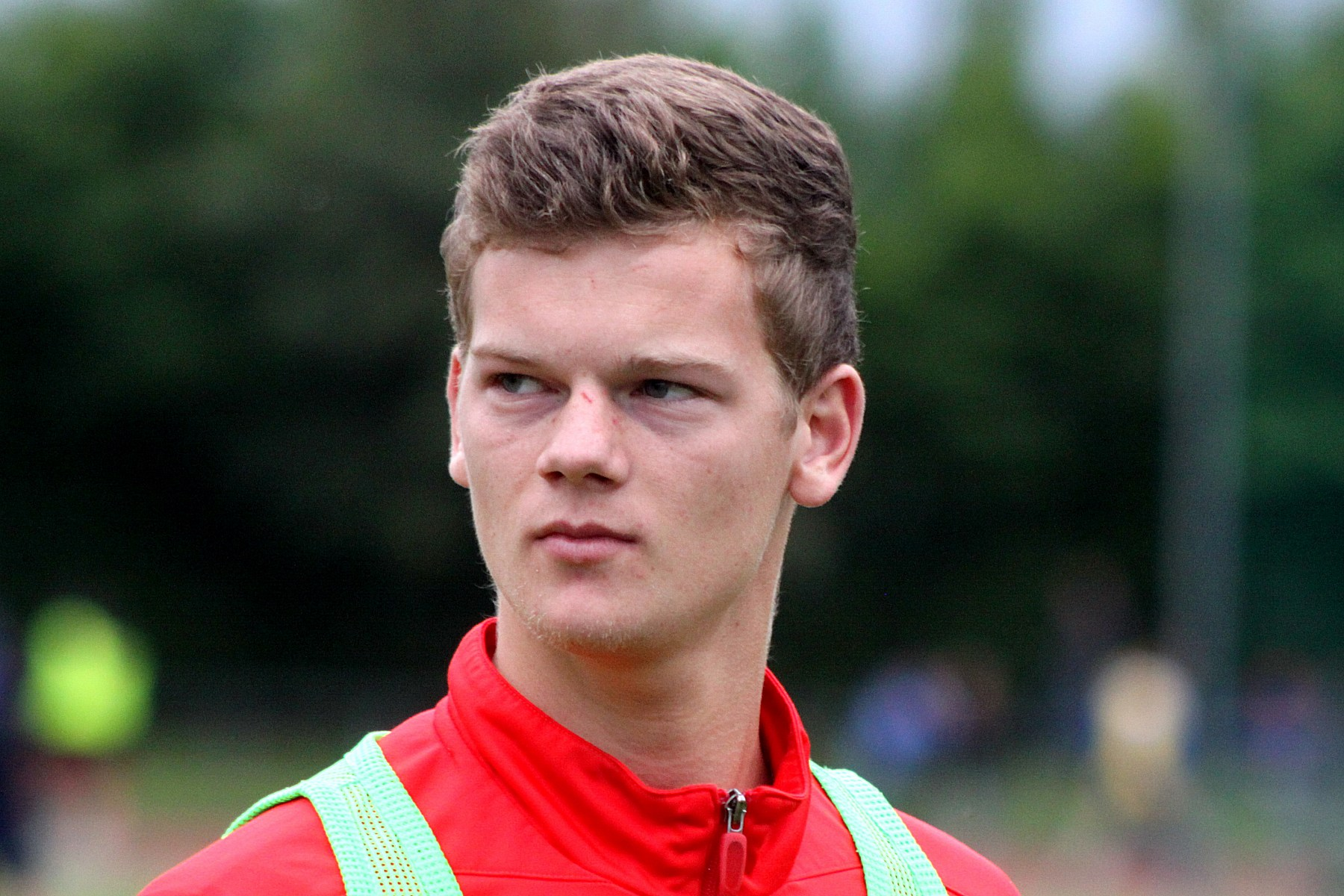 Qualifikationsspiel zur U-19 Fußball-Europameisterschaft: Österreich gegen Frankreich am 10. Juni 2013 (0:1) in Traiskirchen. - Das Foto zeigt Alexander Frank (FK Austria Wien). en Qualification for the 2013 UEFA European Under-19 Football Championship qualification Austria vs. France (0:1) on 2013-2013-06-10 in Traiskirchen. – The photo shows Alexander Frank (FK Austria Wien).